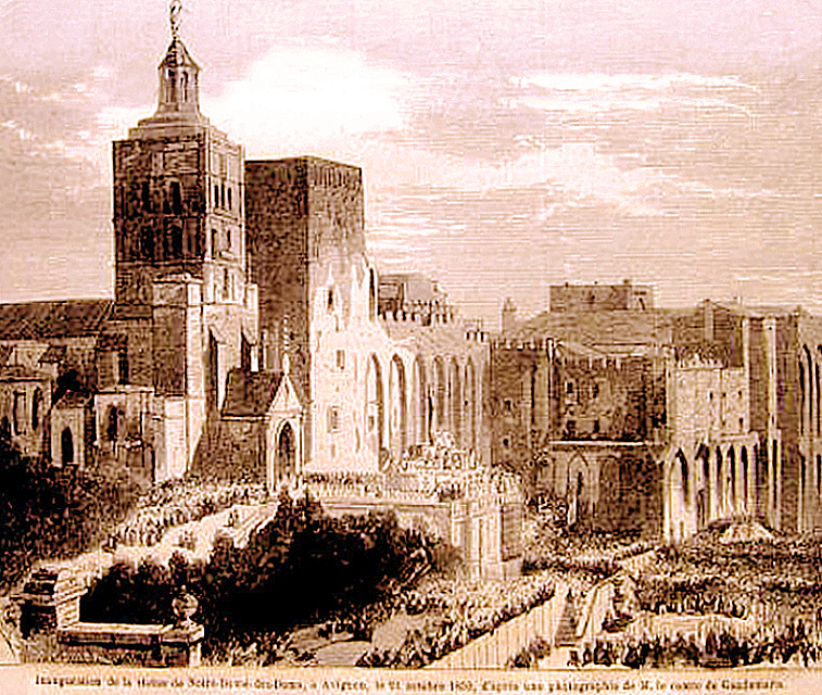 Inauguration de la statue sommant la cathédrale ND des doms